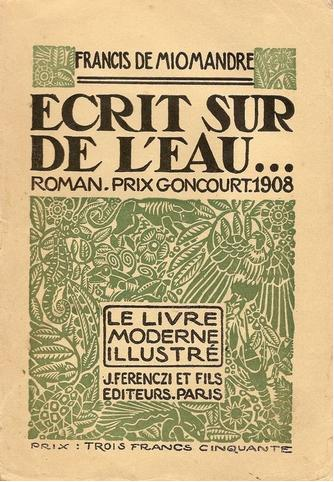 Couverture du premier volume de la collection « Le Livre moderne illustré » publié chez Ferenczi & fils à Paris en septembre 1923 : Écrits sur de l'eau... de Francis de Miomandre, contenant des gravures sur bois de Clément Serveau.